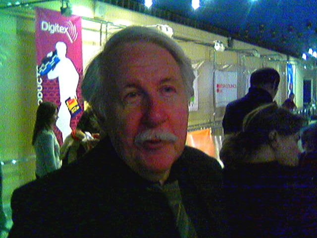 аниматор Андрей Хржановский